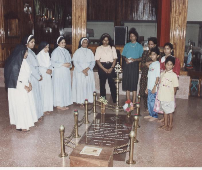 Rev. Fr. Mathew Kadalikattil, Gründer der Herz-Jesu-Schwestern, Grab in Palai, Indien